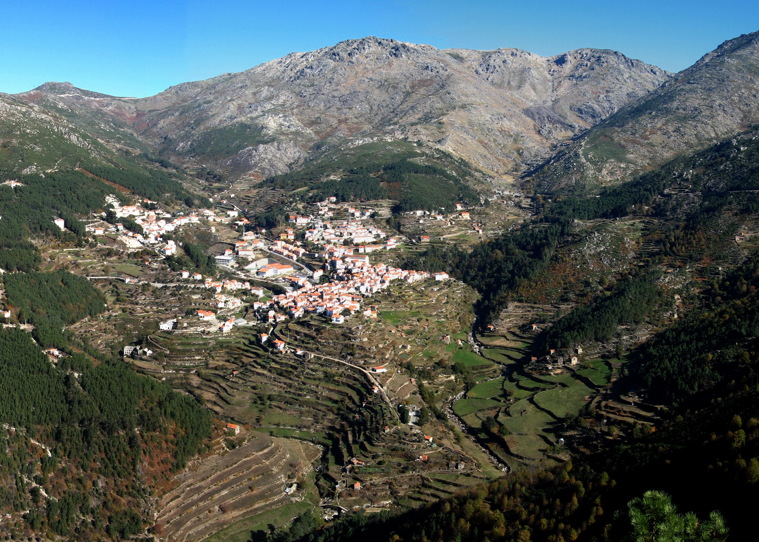 Foto panorâmica de Loriga (junção de 4 fotografias)